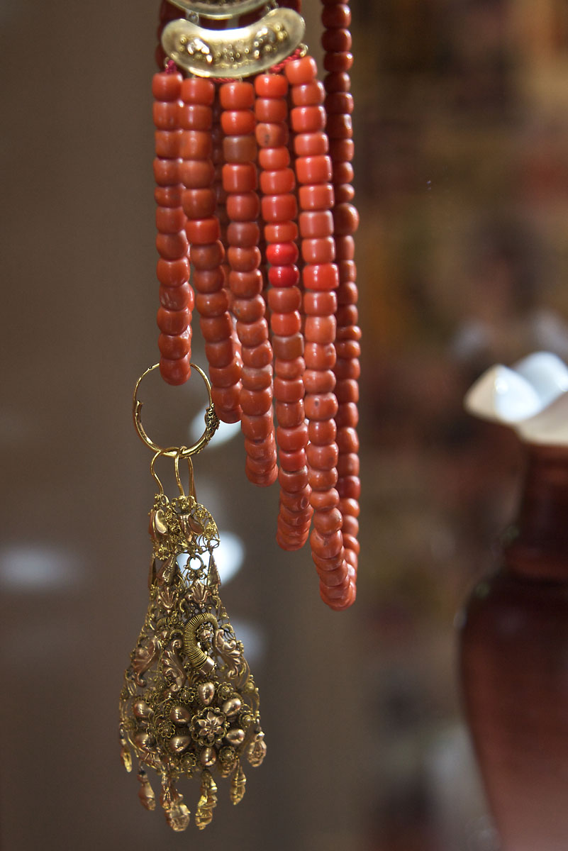 Bloedkoralen collier, Walcheren, 1900-1950 stuk uit de collectie van het Zeeuws Museum. Gefotografeerd in het kader van Wiki Loves ART NL, met een CC-BY-SA licentie